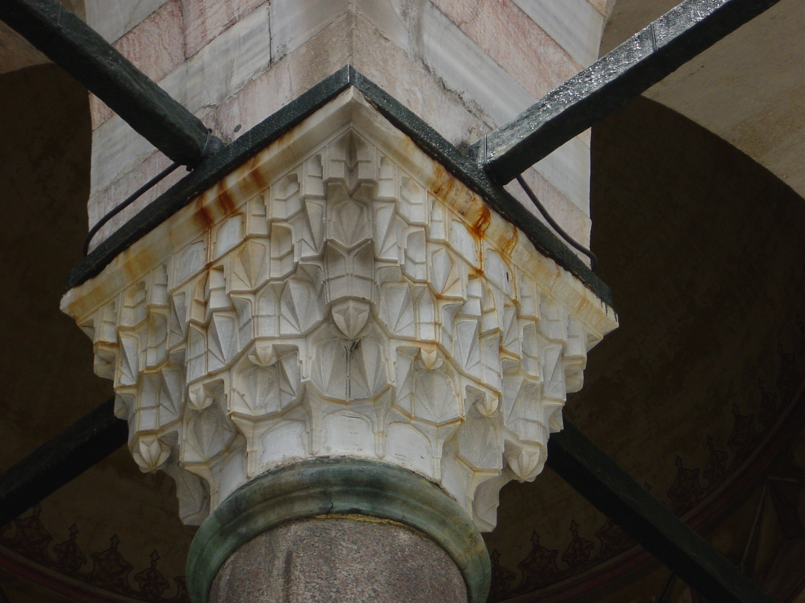 Capitello del portico della Moschea di Solimano il Magnifico ad Istanbul. Foto di: Giovanni Dall'Orto, 26-5-2006.